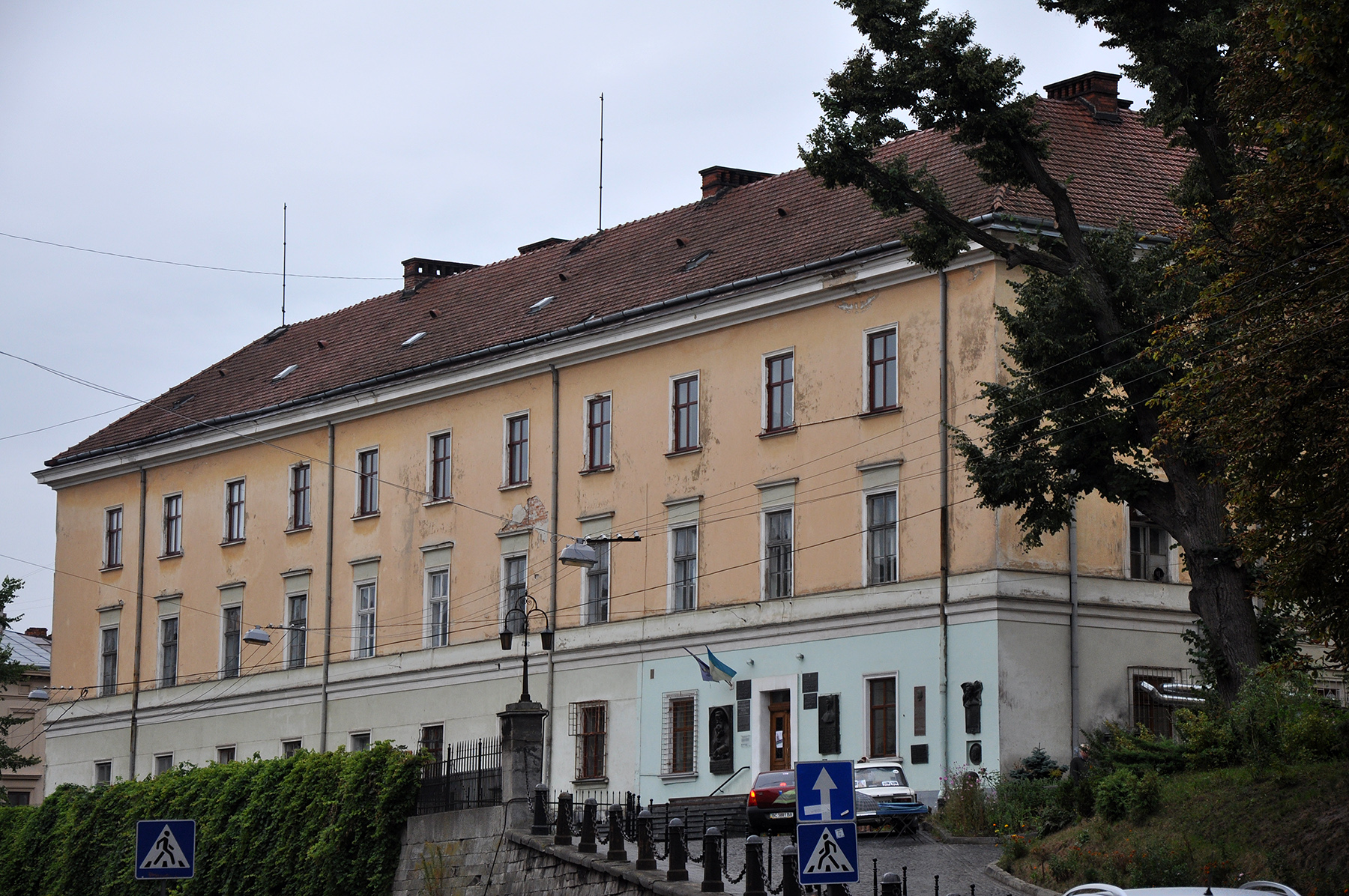 Будинок Львівського університету, в якому вчився Франко І. Я., білоруська поетеса Цьотка (Алоїза Пашкевич) та працював Грушевський М., загинув Коцко А., Львів, Грушевського М., 4